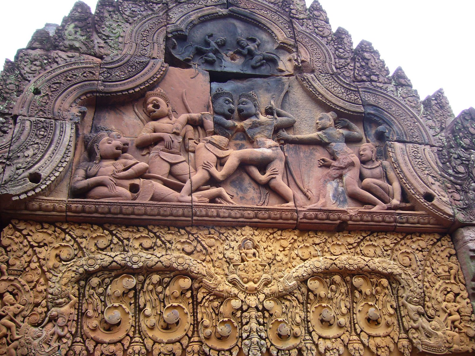 Valin 大戰 Sugriva